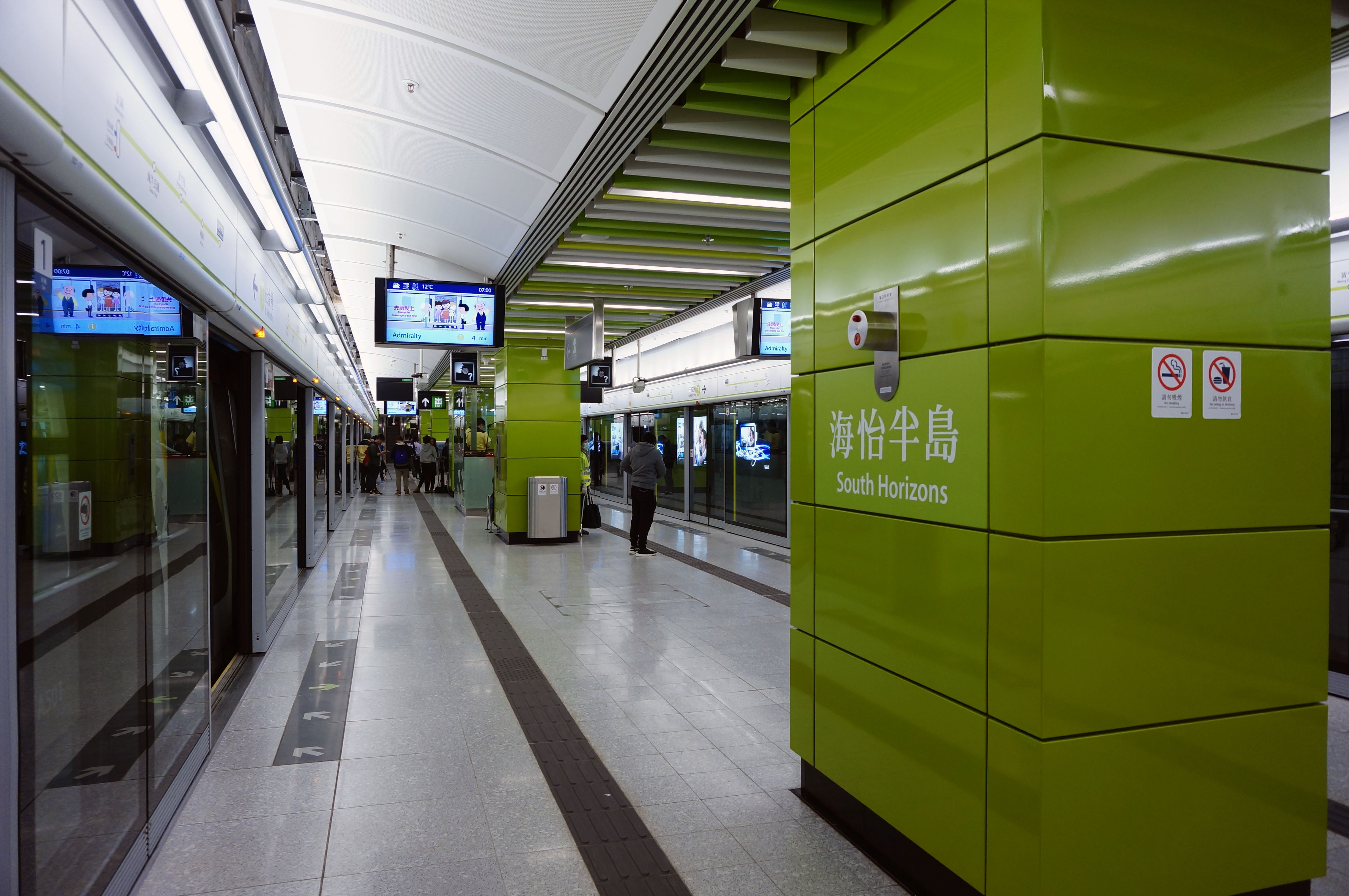 港鐵海怡半島站